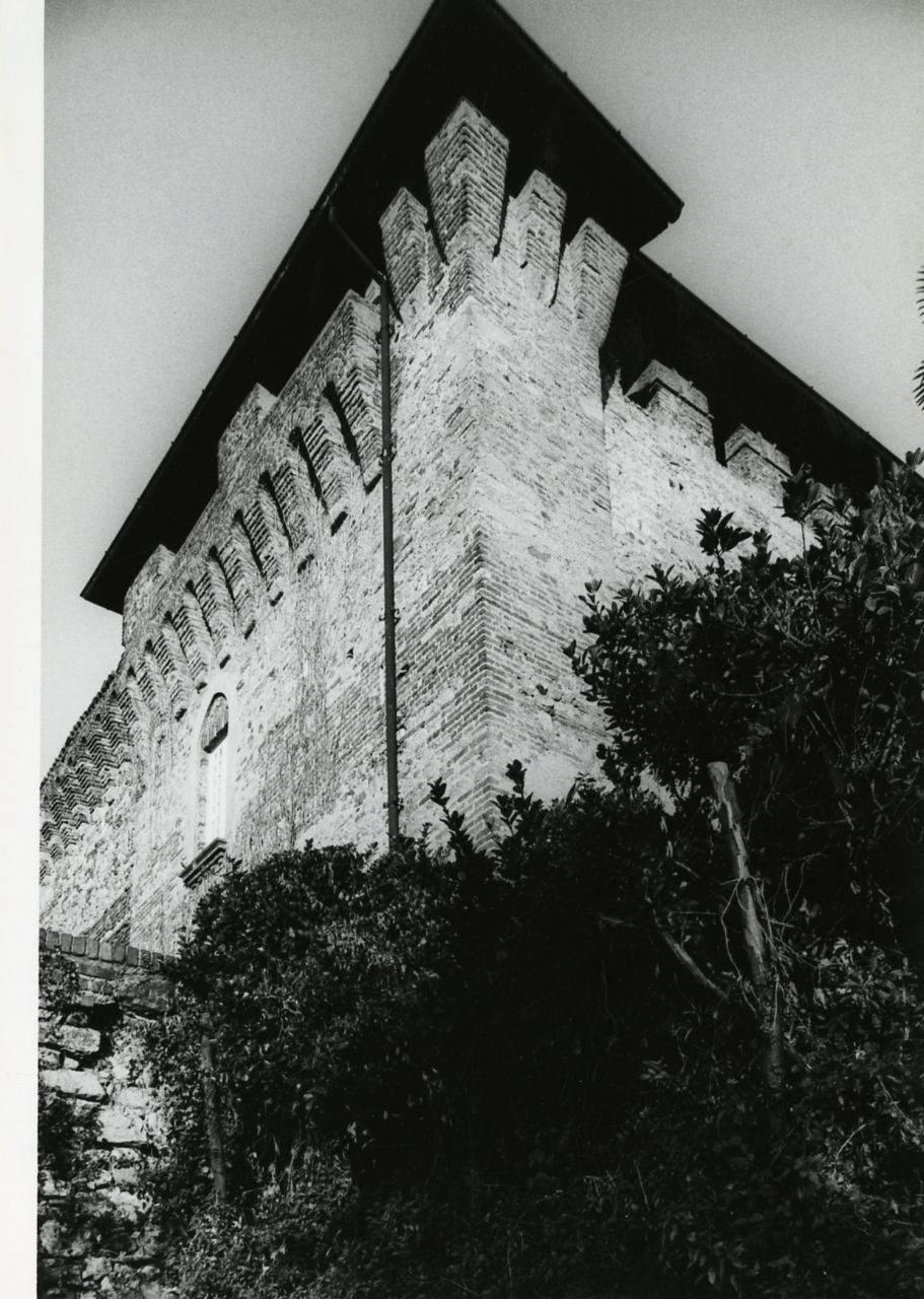 Servizio fotografico : Jerago con Orago, 1980 / Paolo Monti. - Stampe: 3 : Positivo b/n, gelatina bromuro d'argento/ carta, 24x30. - ((Al verso delle stampe manoscritti i numeri dei negativi corrispondenti (formato 35 mm) con indicazione del fotogramma: 3552/21, 3552/22 [tagliato], 3552/23 [tagliato]. - Timbro a inchiostro con copyright: "© Copyright/ Credit to/ Paolo Monti/ Corso Sempione [...]/ Milano". - Sul coperchio della scatola iscrizione didascalica manoscritta a pennarello nero: ""Castelli/ Architettura". - Occasione: Documentazione per la pubblicazione: Vincenti Antonello, "Castelli viscontei e sforzeschi", Milano, Rusconi immagini, 1981. - : Castelli viscontei e sforzeschi, Milano, Rusconi immagini (1981). - Fonte: Agenda di Paolo Monti: Nikon Leika 3001-/ Monti 1978 (1978-1982), presso Archivio Paolo Monti. - Fonte: Monografia di Vincenti, Antonello